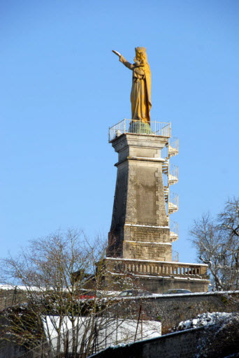 La statue Notre-Dame des dunes - Poitiers (Vienne)